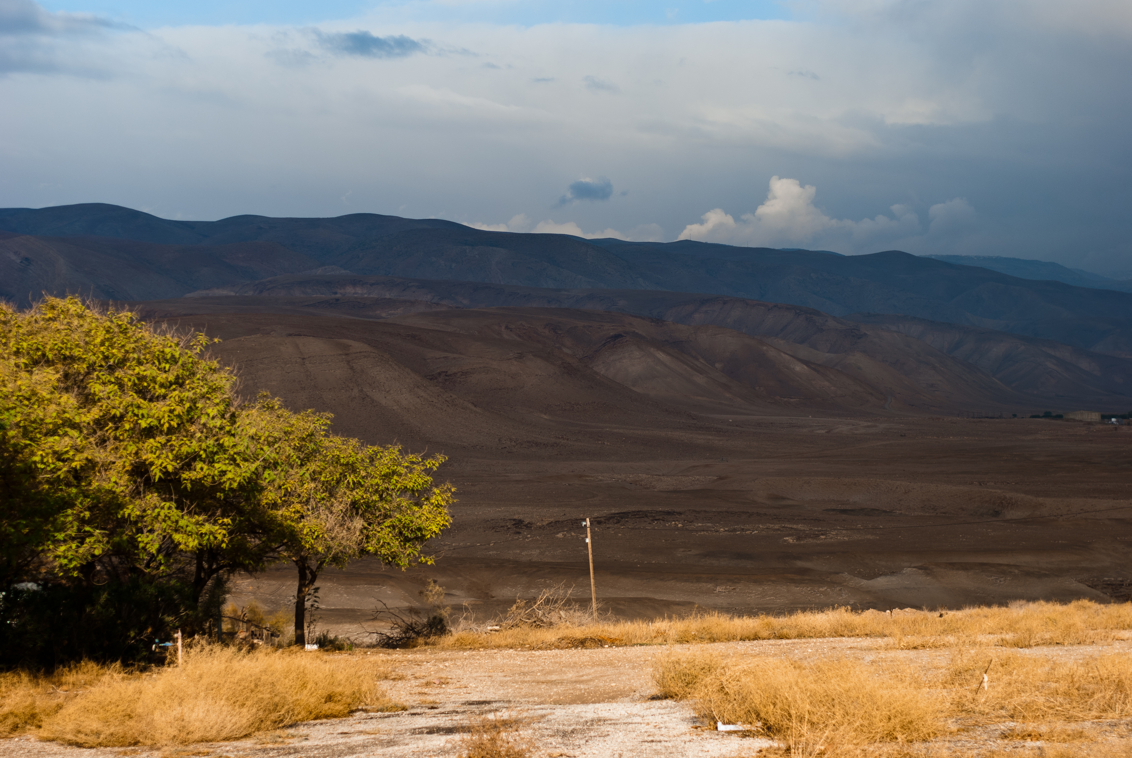 Naaran